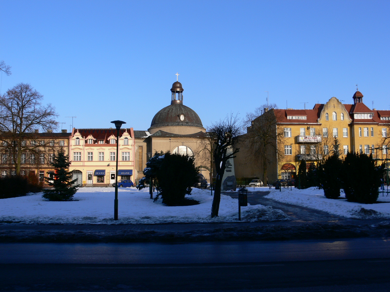 Kruszwica - Rynek w tle Kościół Autor - Bartek Wawraszko